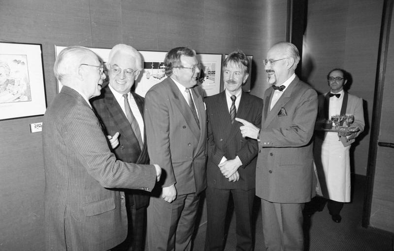 Bonn, 5. Februar 1990 Der Chef des Presse- und Informationsamts der Bundesregierung, Bundesminister Hans Klein, und der Bundesminister für Arbeit und Sozialordnung, Dr. Norbert Blüm, eröffneten im Presseclub die Ausstellung "Finnische und Deutsche Karikaturen". Unter der Schirmherrschaft des Botschafters der Republik Finnland in Bonn, Antti Karppinen, zeigten der finnische Karikaturist Terho Ovaska und der Bonner Karikaturist Klaus Böhle politische Karikaturen der letzten Jahre. Im Bild: (v.r.n.l.): Bundesminister Hans Klein, der finnische Karikaturist Terho Ovaska, der Leiter der Presse- und Kulturabteilung im finnischen Außenministerium, Ralf Friberg, der Bonner Karikaturist Klaus Böhle, der finnische Botschafter Antti Karrinen